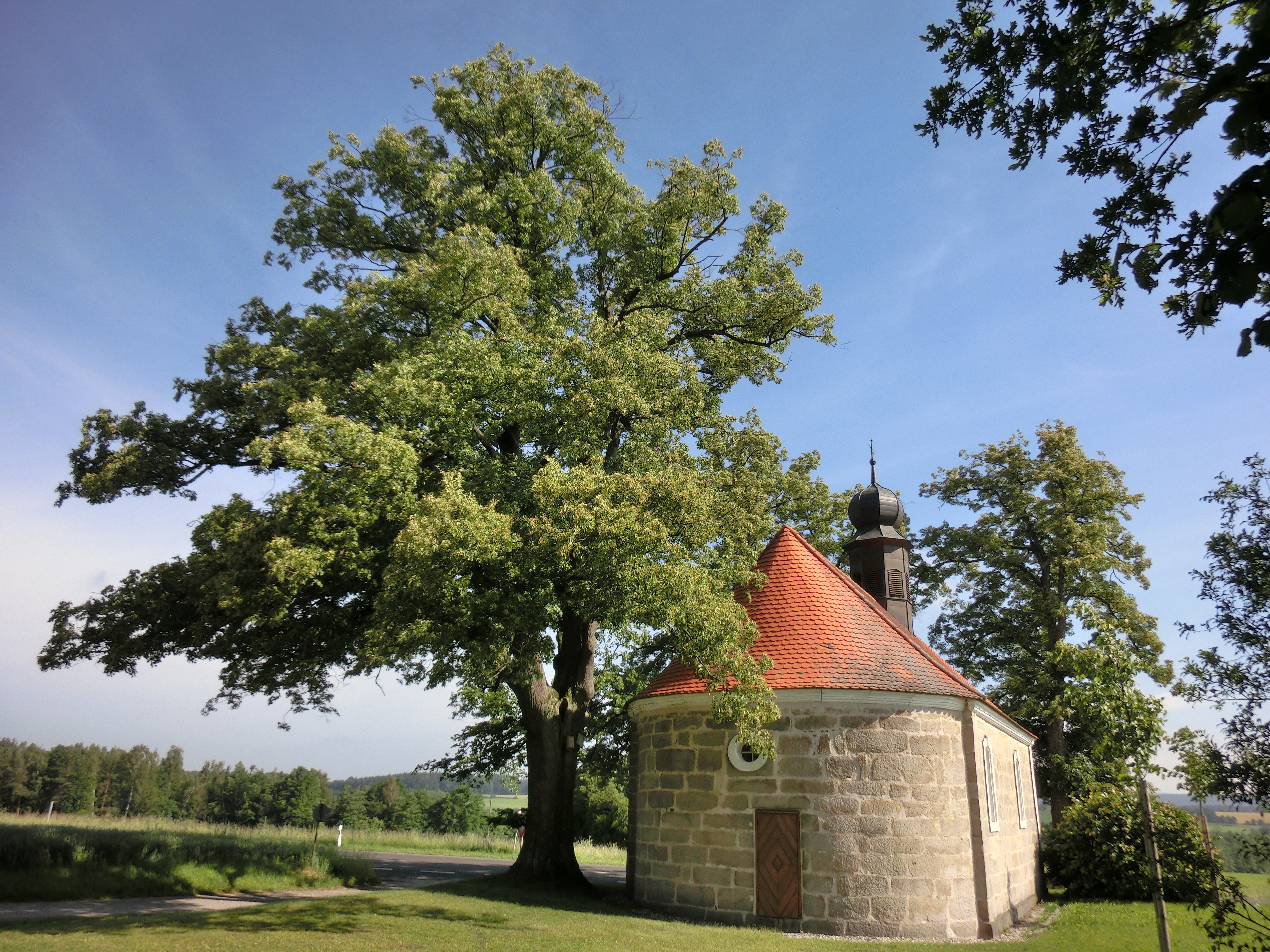 Dreifaltigkeitskapelle 1